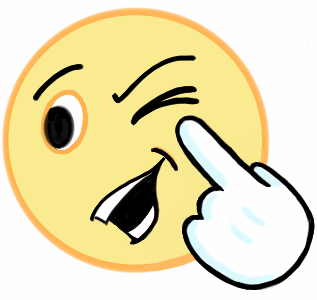 immagine (grande) per emoticon occhiolino con il dito - sgamato